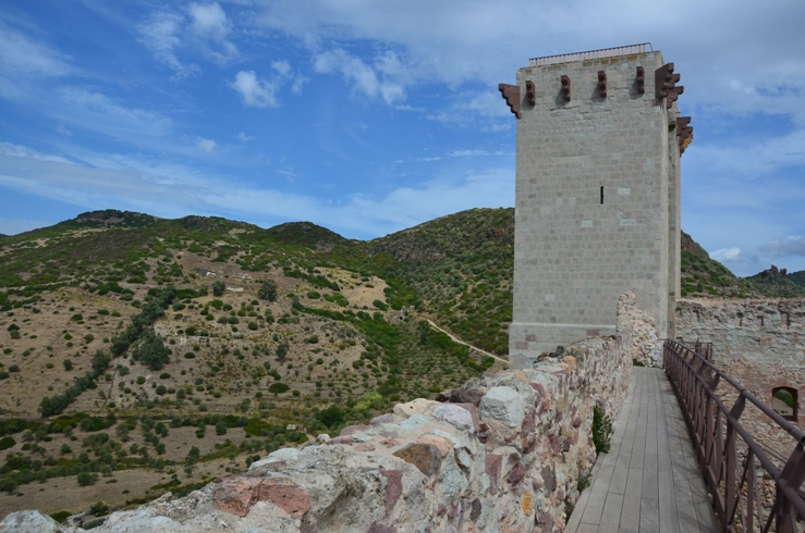 Serravalle vára, Szardínia, Olaszország